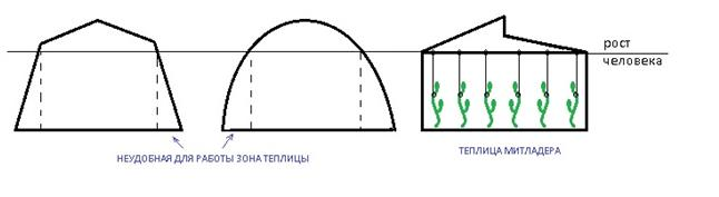 Общий вид теплицы доктора Миттлайдера. Теплица по Митлайдеру - сравнение конструкций.